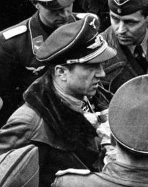 Ritterkreuzträger (jetzt Lufthansa) ObLt Jope meldet sich beim Kdr. Hptm. Fliegel nach einem Feindflug zurück. Vorn Links mit dunklen Spiegeln: Stabsarzt Kohler 1. KG 40 Bordeuax 1941 Aufn. Lt. [Eckart] Brandt